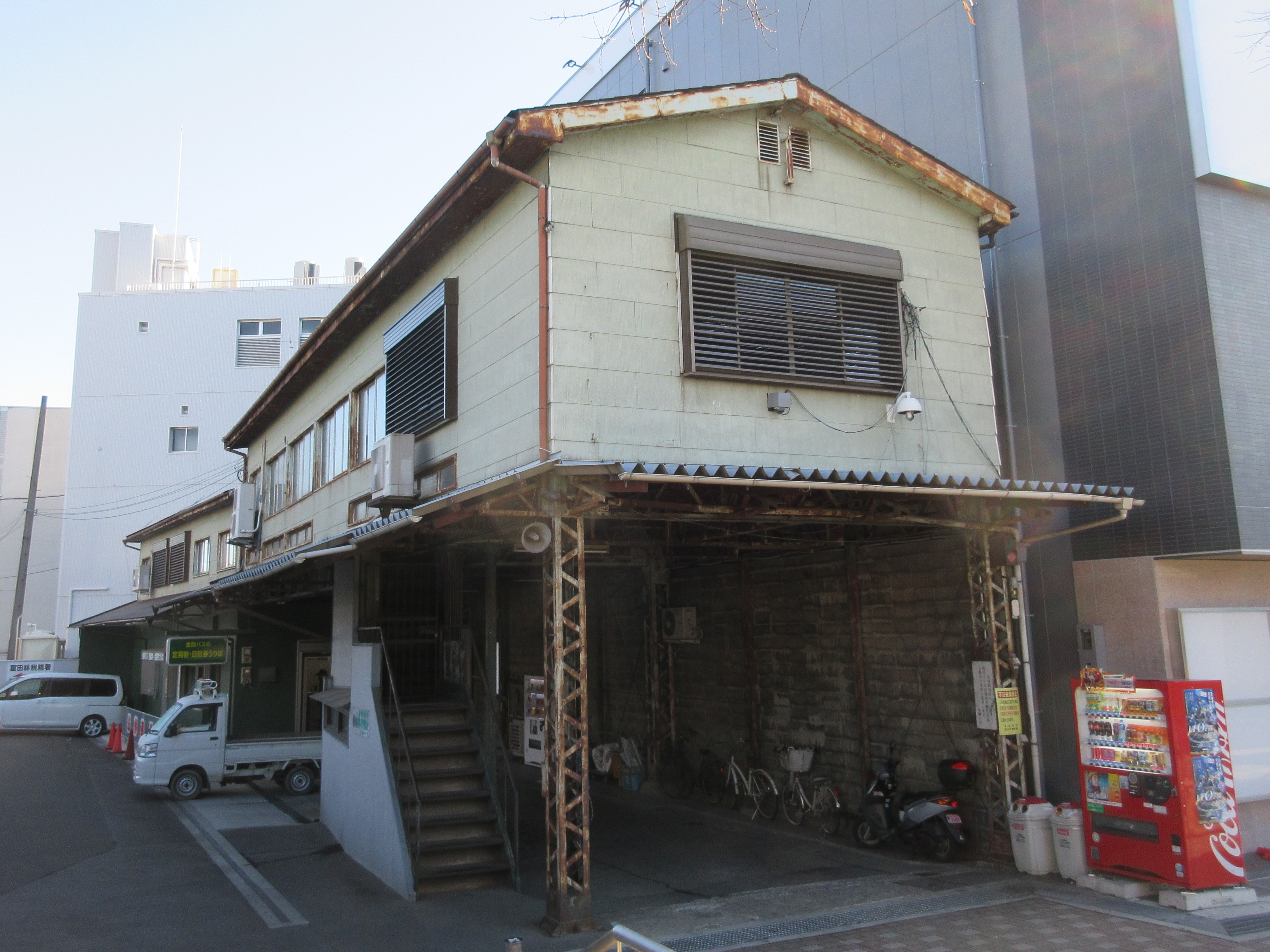 金剛自動車本社・富田林営業所